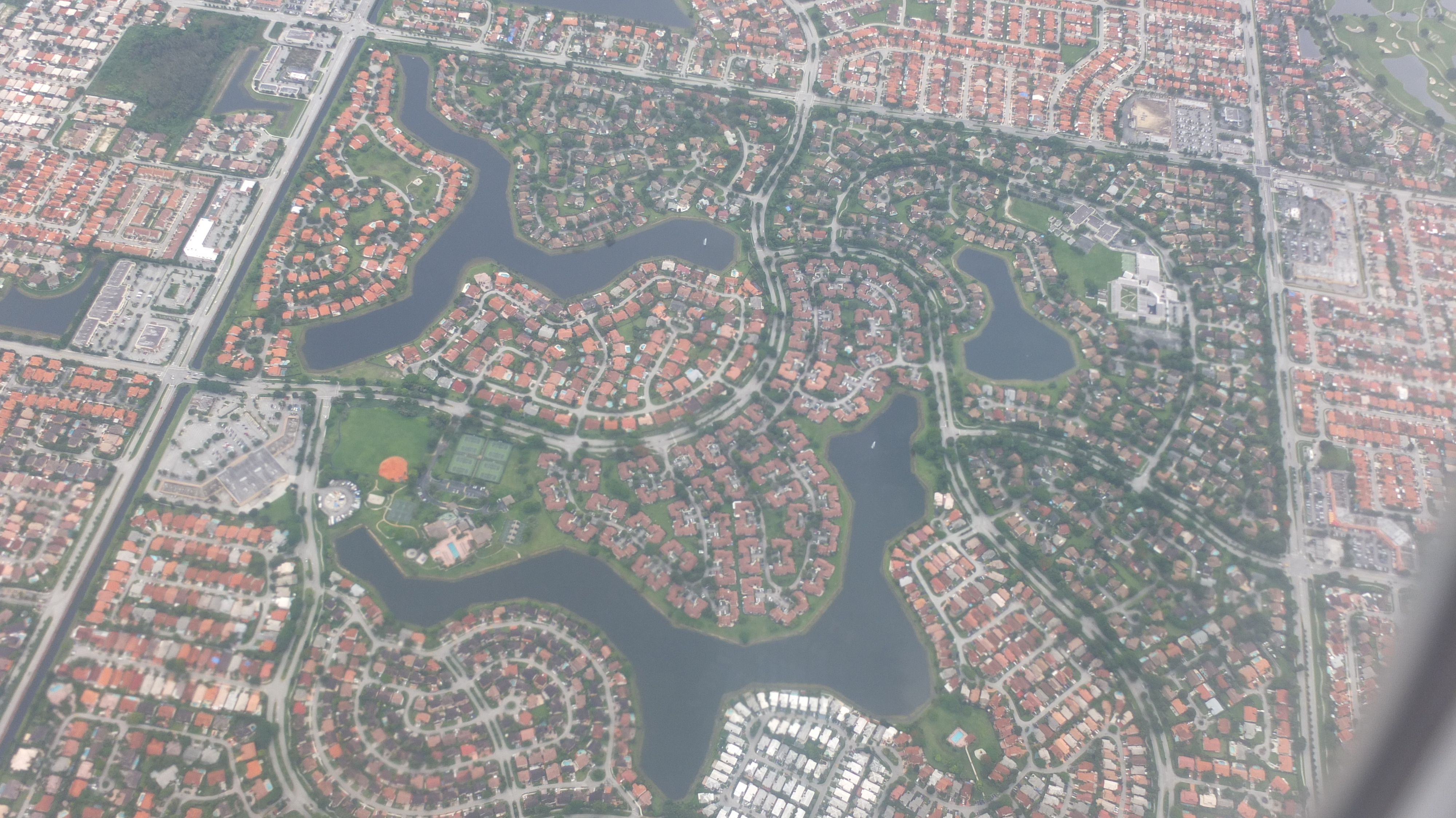 Vue aérienne d'un quartier résidentiel de Miami